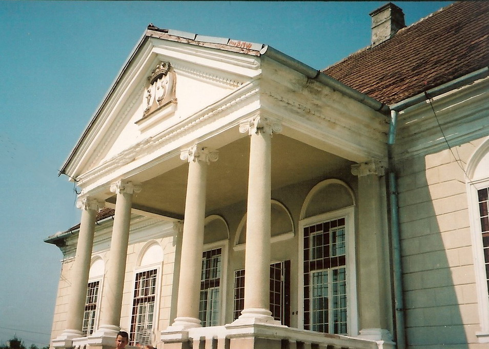 Câmpia Turzii, Str.Teilor nr.10, Grădinița "Pinochio" (fostul conac Betegh)